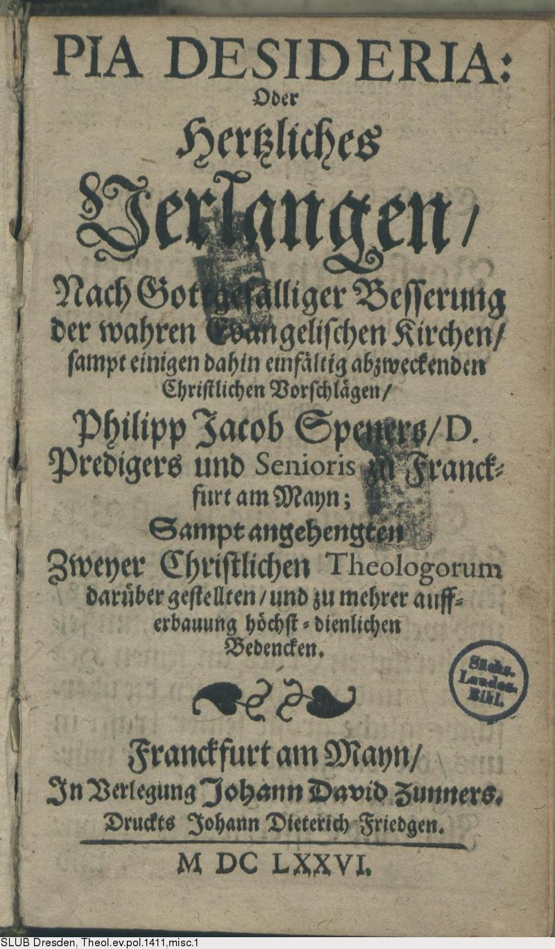 Page de titre de l'édition princeps de Pia desideria de Philipp Jacob Spener, texte fondateur du piétisme allemand. Coll. Deutsches Textarchiv, Berlin-Brandenburgische Akademie der Wissenschaften.